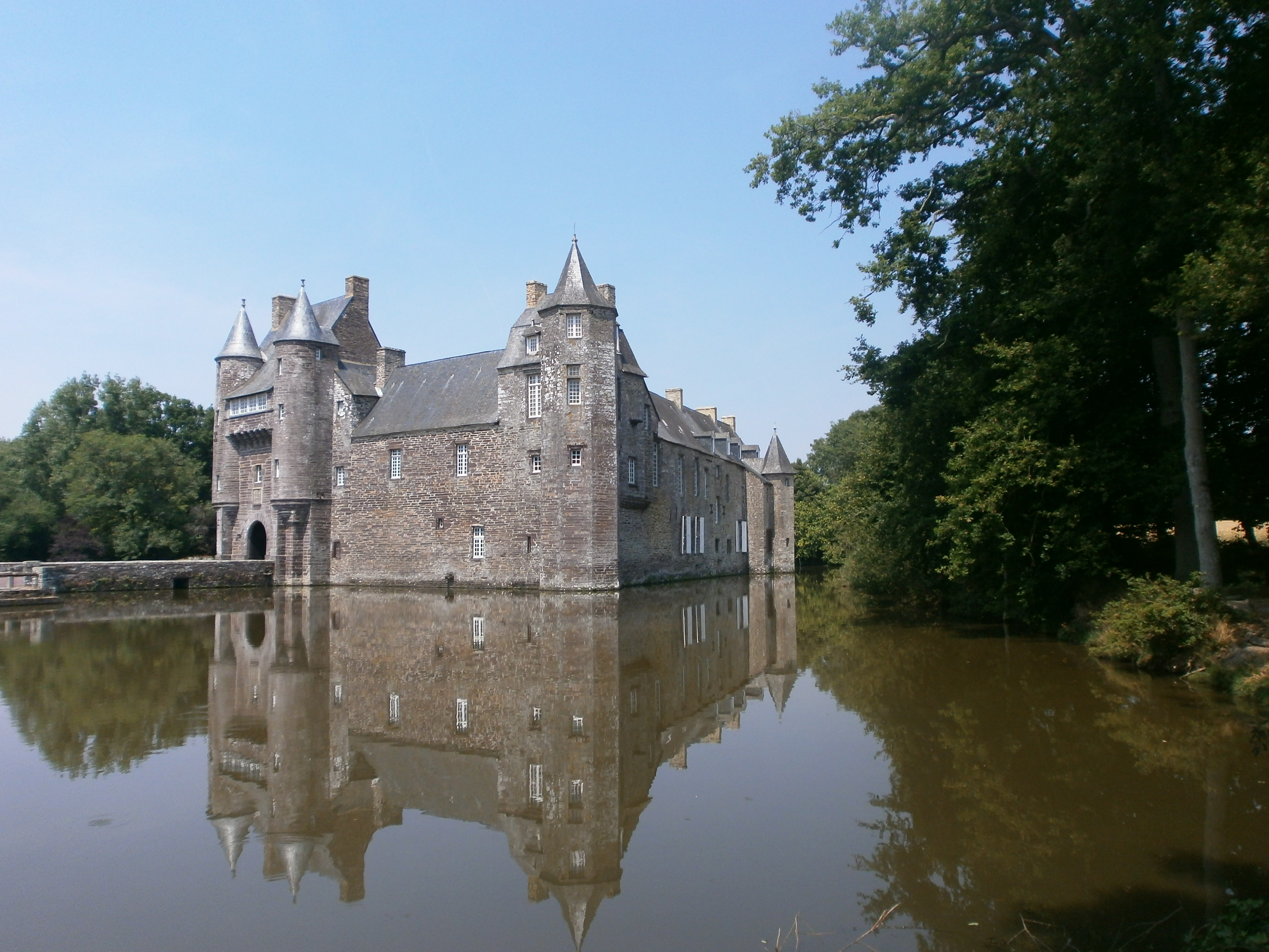 Château de Trécesson, Campénéac, Porhoët